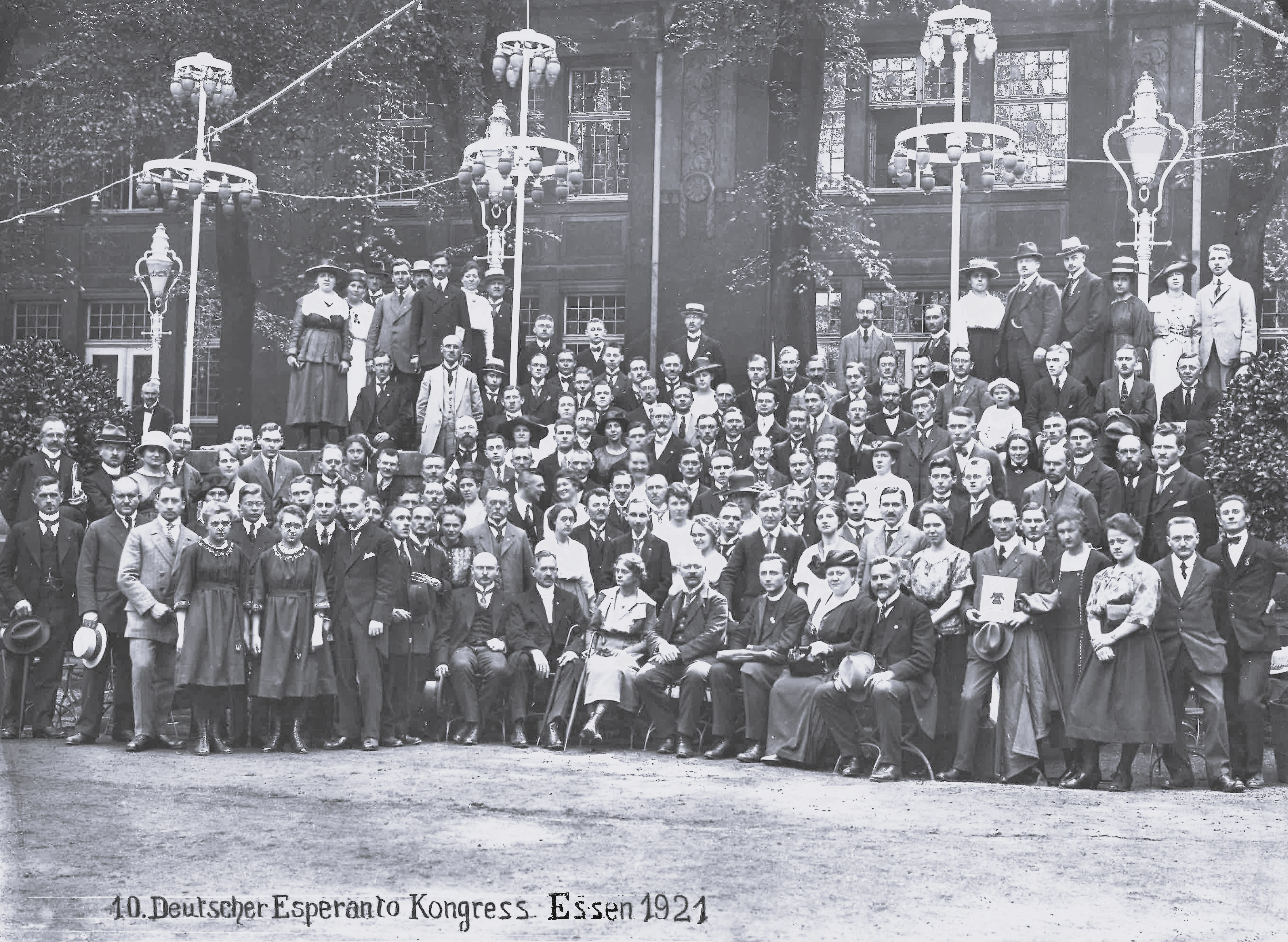 Das Foto stammt aus dem persönlichen Nachlass von Friedrich Pillath. Es wurde in der 35. Ausgabe von Esperanto Triumfonta am 5. Juni 1921 auf Seite 4 öffentlich annonciert[1] .